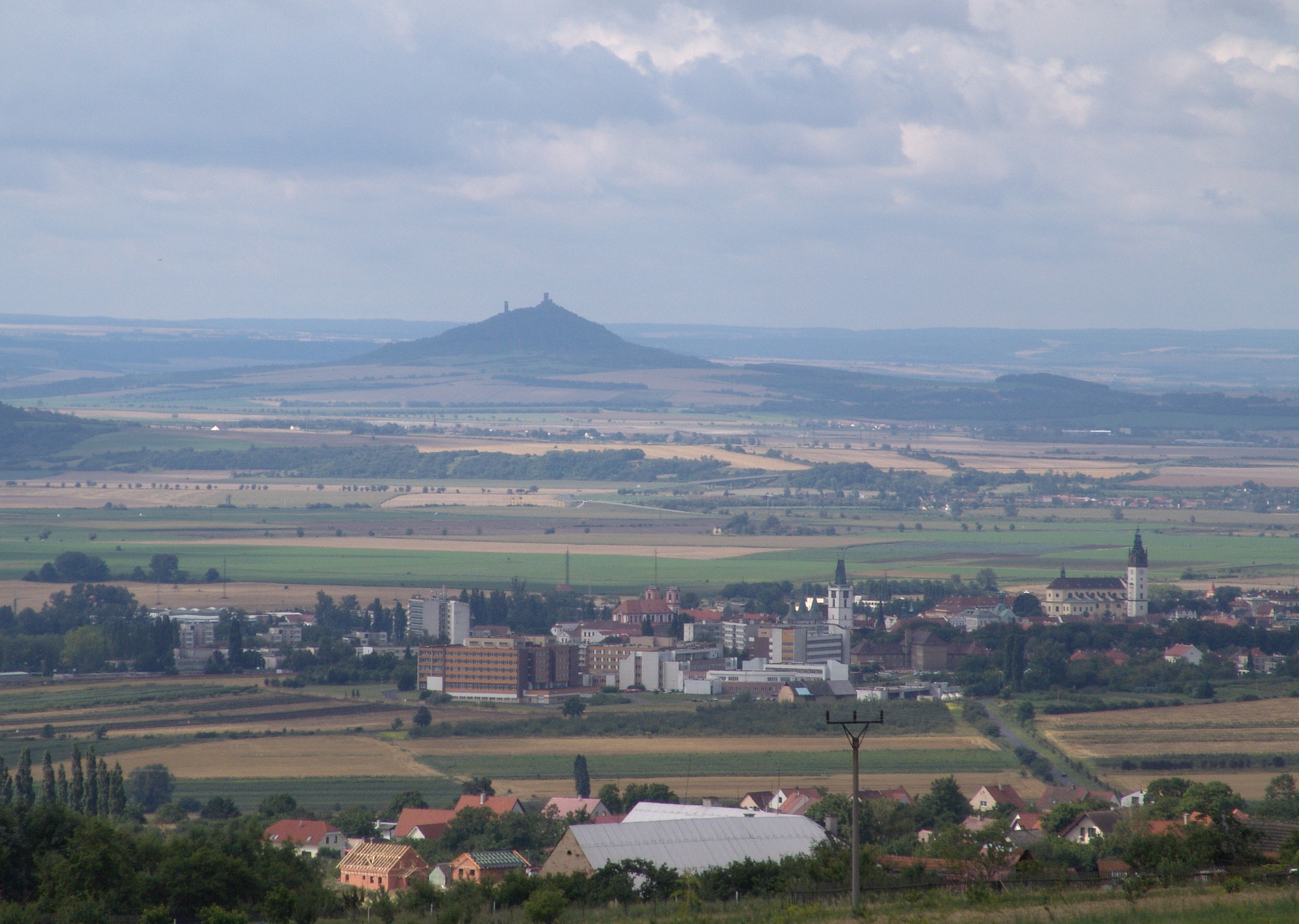 Pohled od Pohořan přes Žitenice na město Litoměřice. V pozadí Hazmburk.